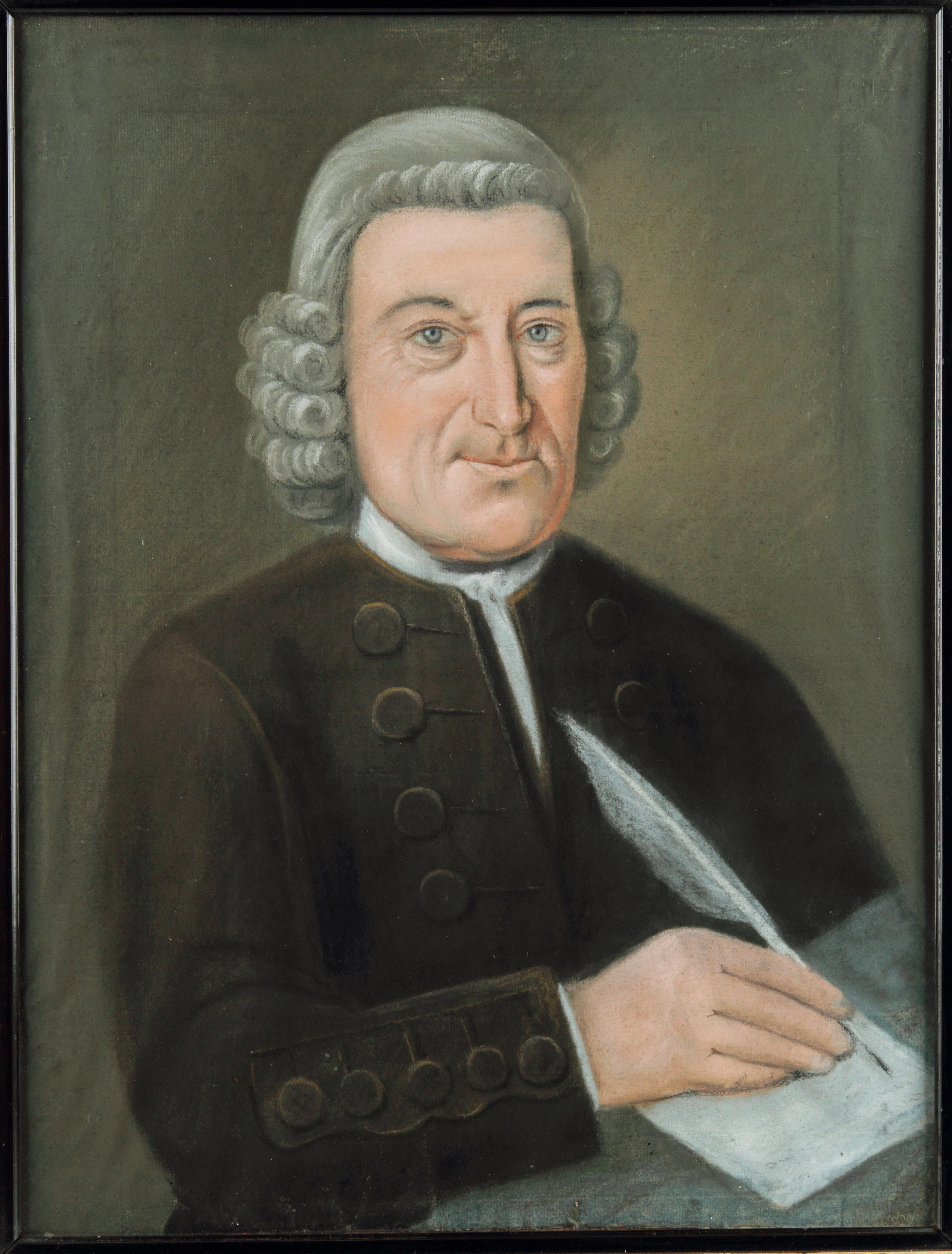 Portret van Hylke Jans Kingma (1708-1782)